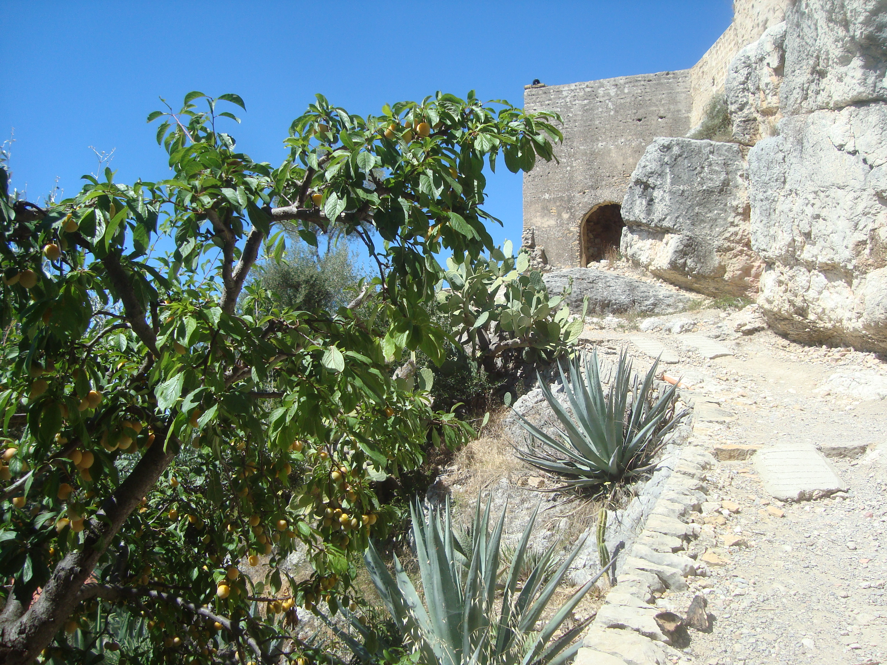 Castell de Cervera (Cervera del Maestrat)